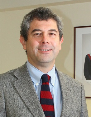 Ex Intendente de la Región de la Araucanía